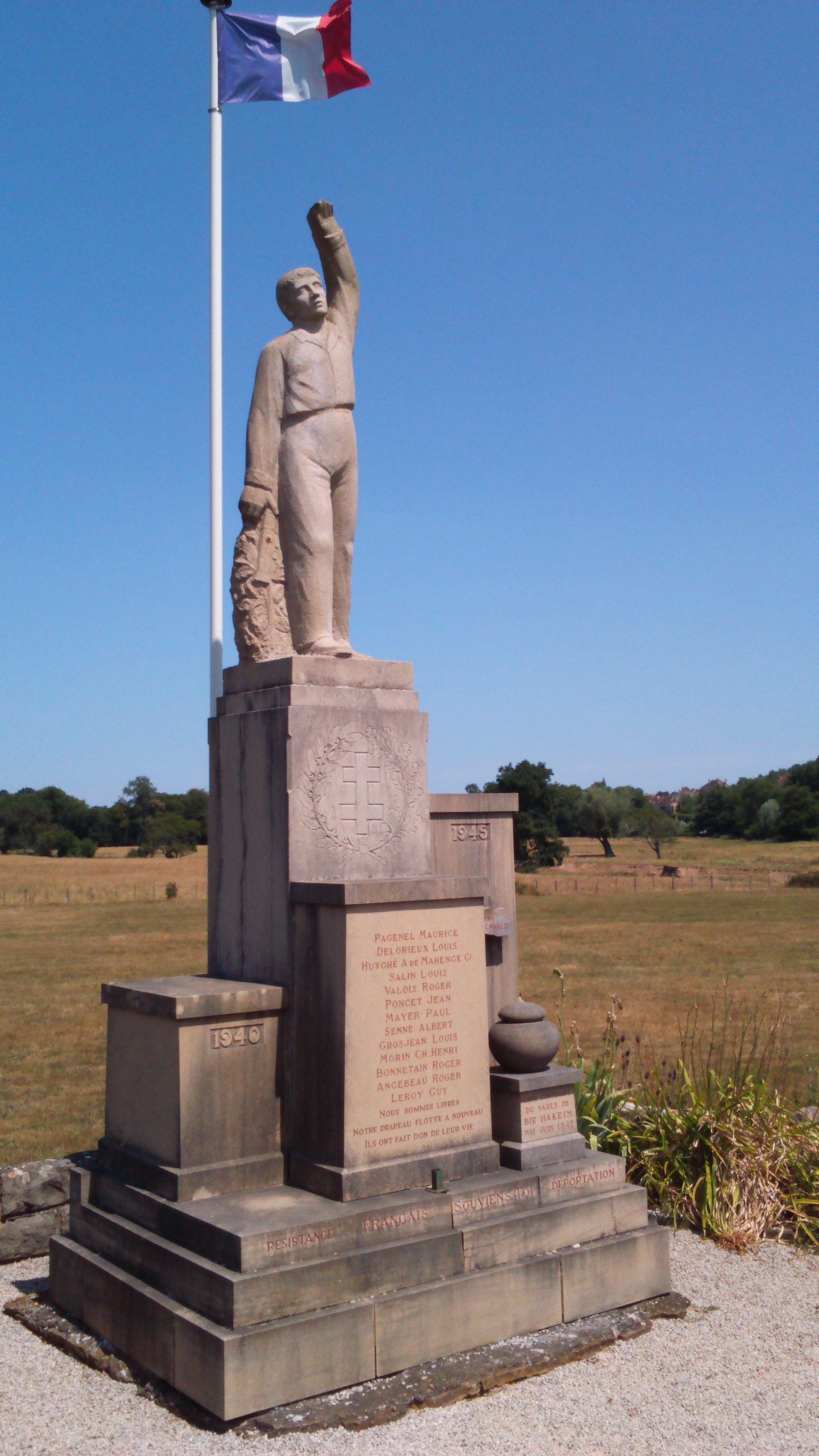 1940-1945. Résistance-Français souviens toi-Déportation. Monument situé route de Cluny à la sortie de Cormatin. 13 noms sont inscrits : "Nous sommes libre. Notre drapeau flotte à nouveau. Ils ont fait don de leur vie"